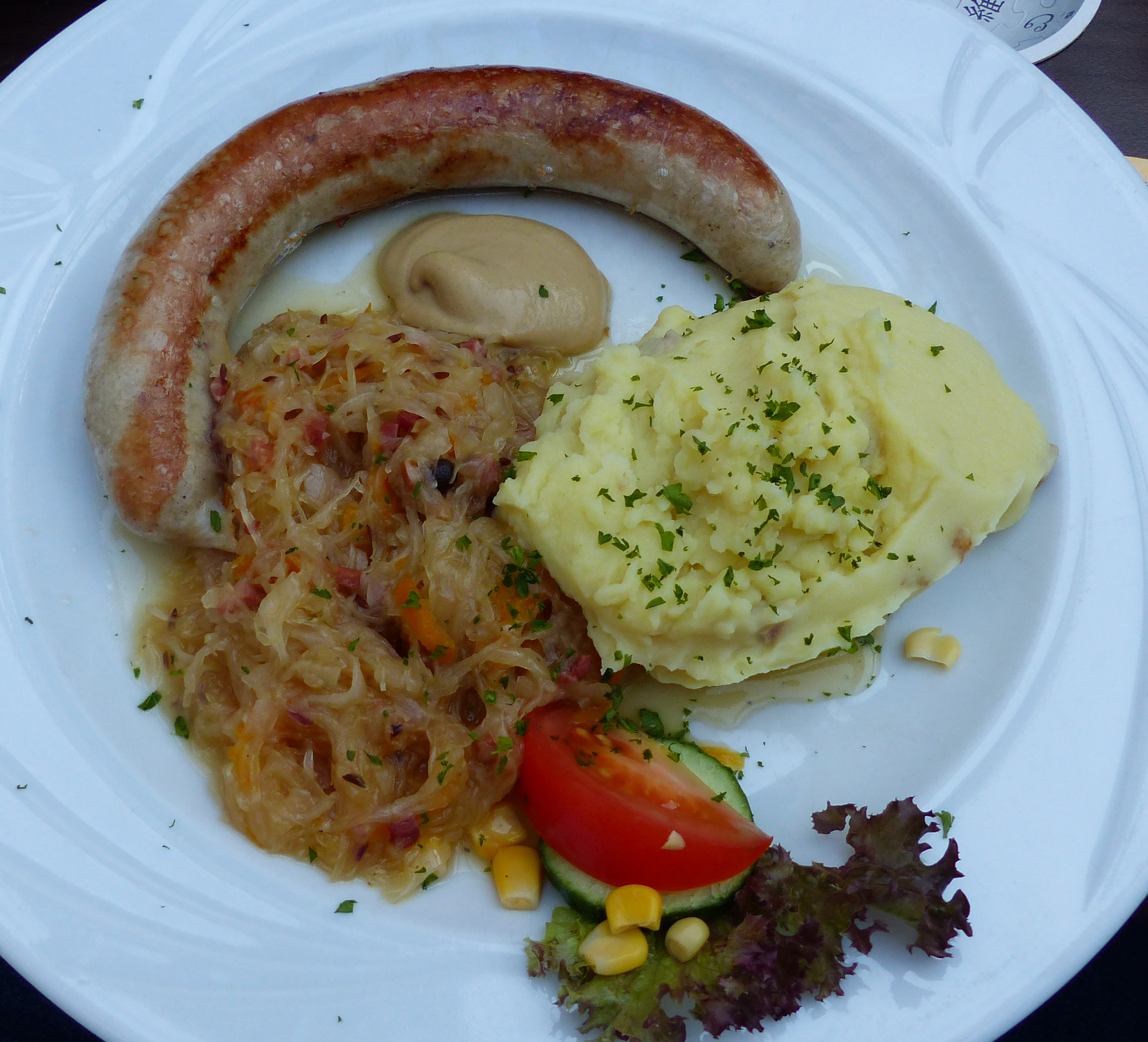 Thüringer Bratwurst, Köstritzer Schwarzbierhaus, Weimar